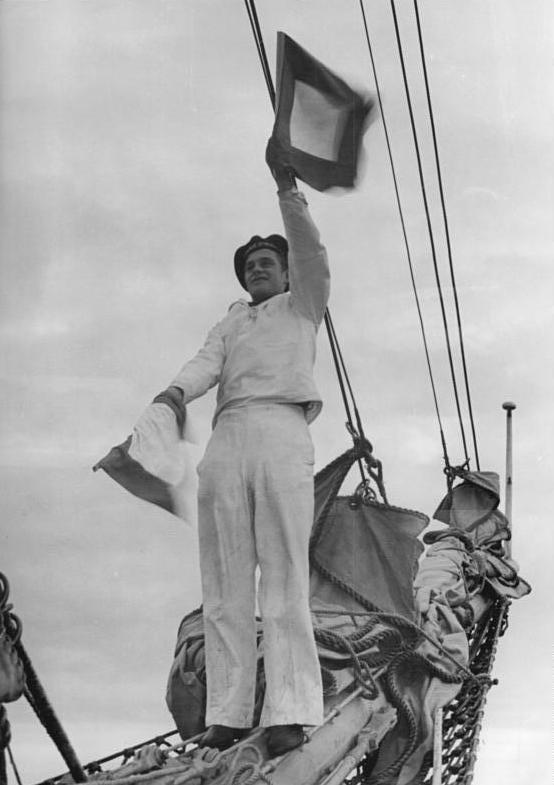 Segelschulschiff "Wilhelm Pieck", Signalgast Segelschulschiff "Wilhelm Pieck" Die zukünftigen Kapitäne, Steuerleute und Maate unserer Handelsflotte werden auf der schmucken Zweimaster-Schonerbrigg "Wilhelm Pieck" in einem 10-wöchigen Lehrgang ausgebildet. Die Schüler, die aus allen Teilen der DDR kommen und der Interessengemeinschaft für Wassersport der Freien Deutschen Jugend angehören, lernen unter Anleitung des erfahrenen Kapitäns Weitendorf, der vier Offiziere und einer 10-köpfigen Stammannschaft mit grosser Begeisterung die Bedienung des Segelschiffes. Sie wissen, dass der Tag eines einheitlichen Deutschlands nicht mehr fern ist und freuen sich darauf, mit unseren Handelsschiffen alle Meere befahren zu können. Was sie gelernt haben, werden sie dann erst richtig beweisen können. UBz: Der Signaldienst erfordert eine schnelle Auffassungsgabe. Es ist nicht so leicht wie es aussieht. - Zentralbild-Sturm 27.12.1951